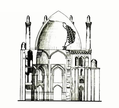 Olcaytu Xudabəndə türbəsinin kəsiyi